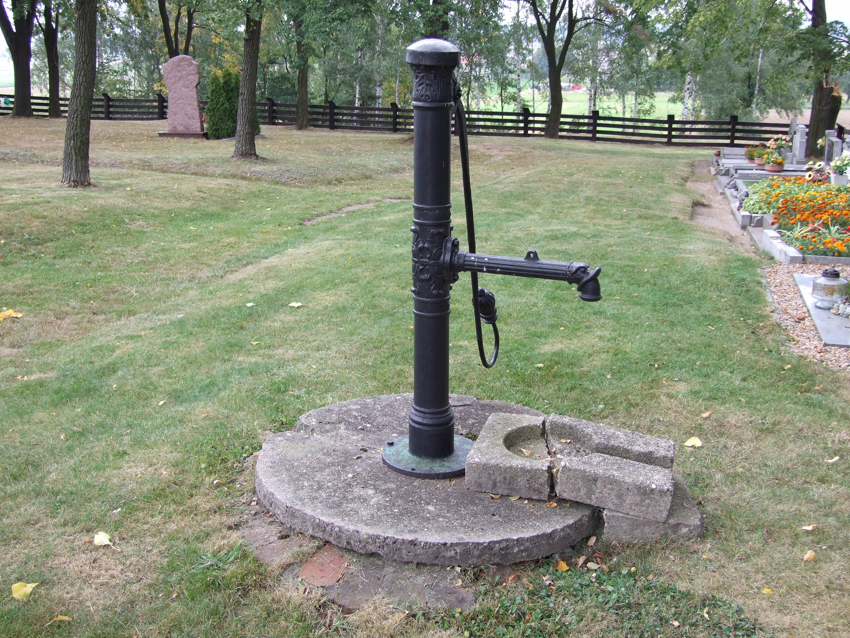 Kościół św. Rocha w Grodzisku (powiat oleski)